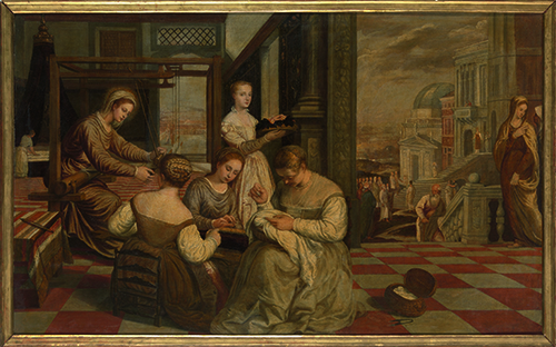 Lambert Sustris, Maria weeft de kleren van Christus, 1540-1560, olieverf op doek, 110 x 175 x 3,9 cm.